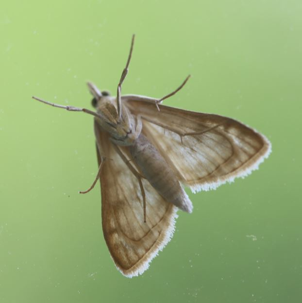 Königskerzen-Zünsler (Paracorsia repandalis) am 19. Juli 2020, Ventralansicht